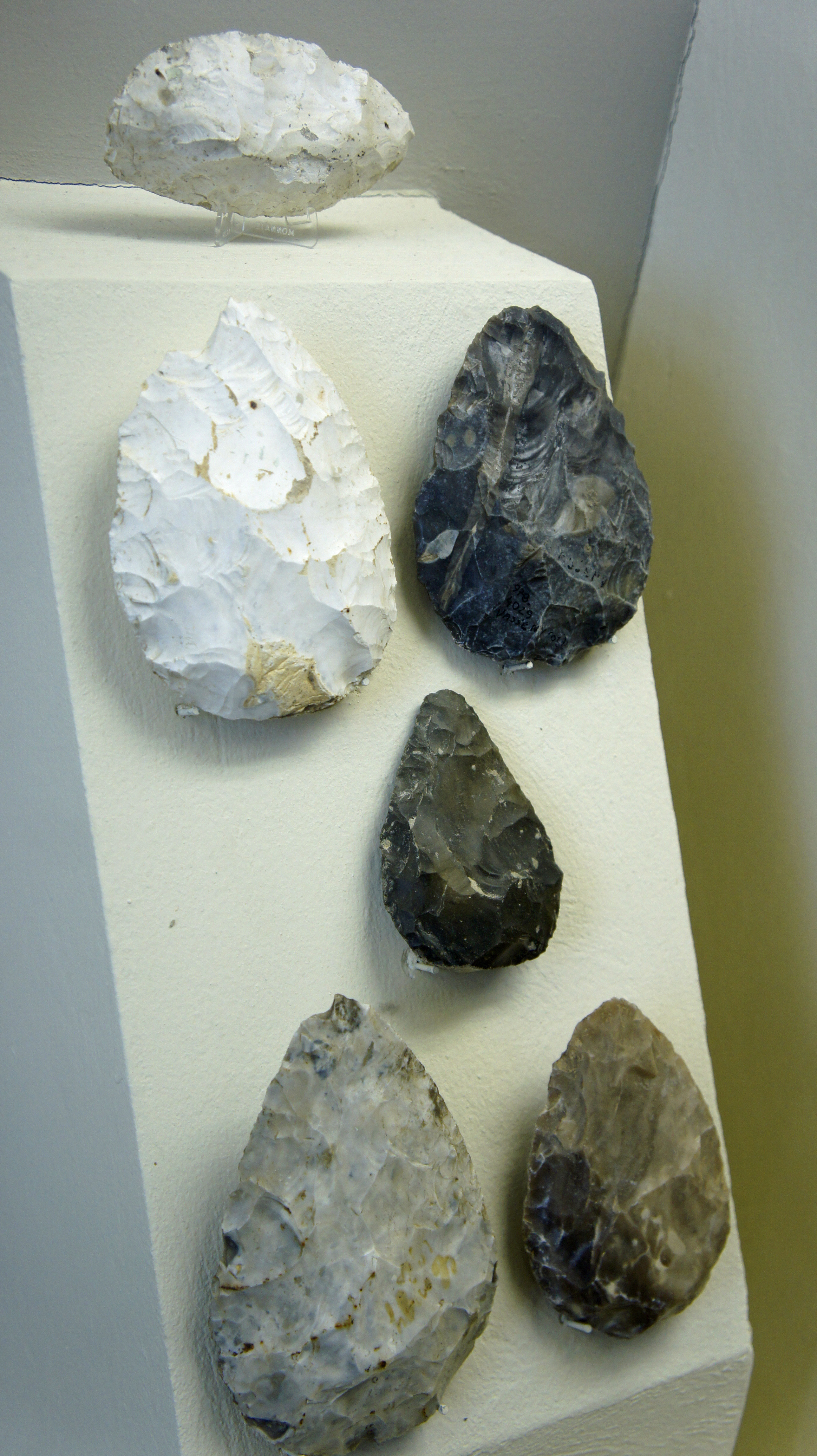 Artefacts du Moustérien trouvé dans la Marne .